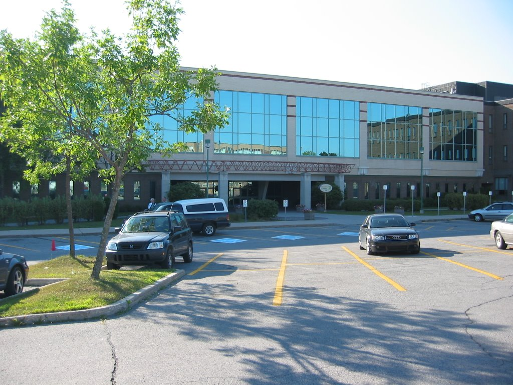 UQO - Lucien-Brault